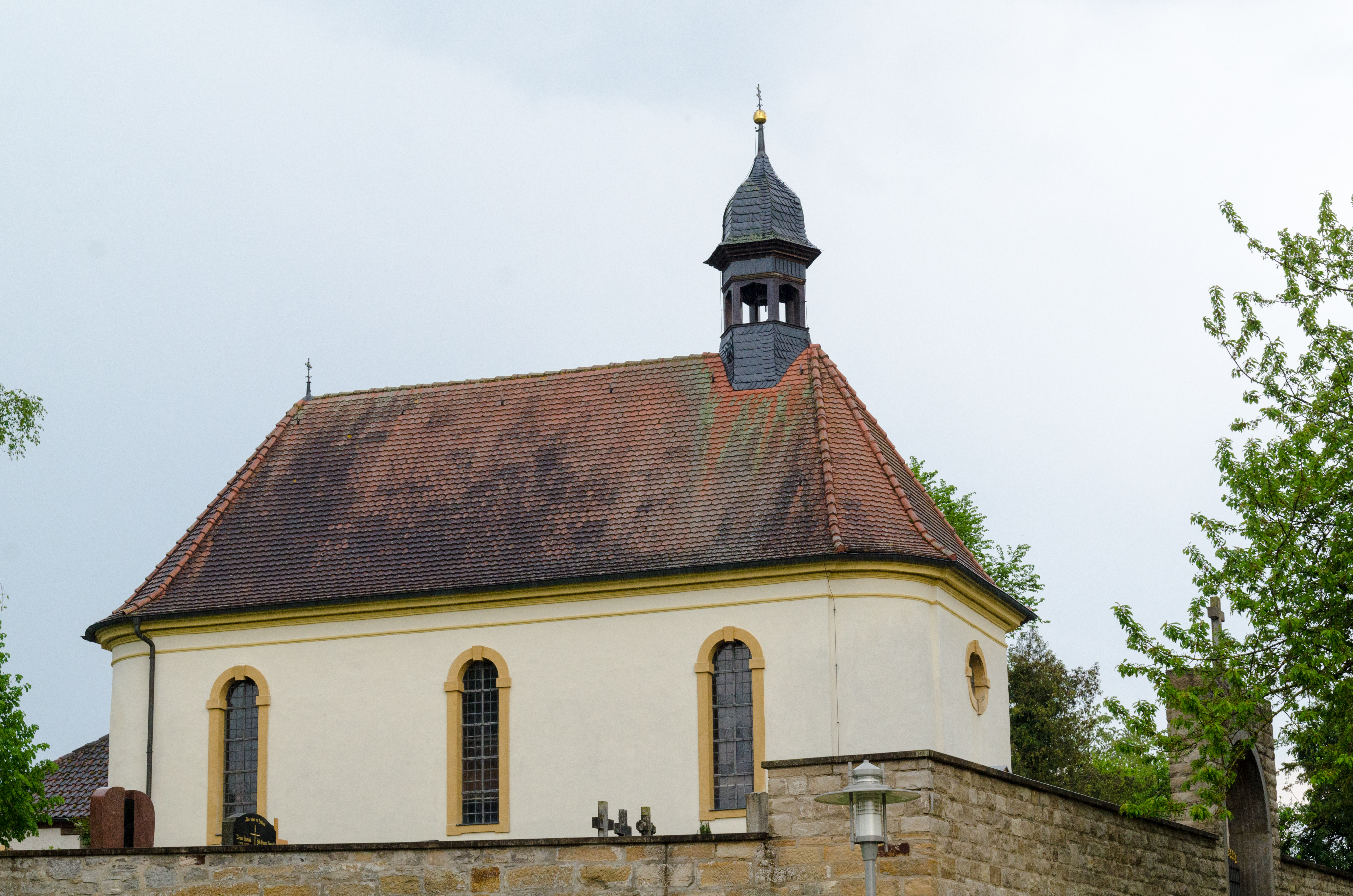 Iphofen, Mönchsondheim, Friedhofskapelle